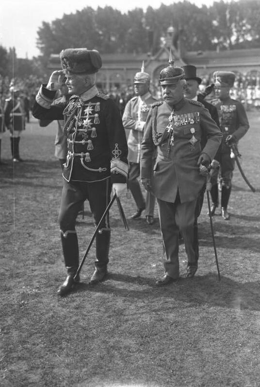 Title: August von Mackensen People in the image: Mackensen, August von (1849-1945; Generalfeldmarschall, kaiserliches Heer, Preußen), Deutschland Factual corrections and alternative descriptions are encouraged separately from the original description. Additionally errors can be reported at this page to inform the Bundesarchiv. Original historic description: Dresden.- 1. Waffentag der Deutschen Kavallerie. Generalfeldmarschall August von Mackensen und Generalleutnant von der Decken beim Abschreiten der Front der Kavalleristen im Stadion.